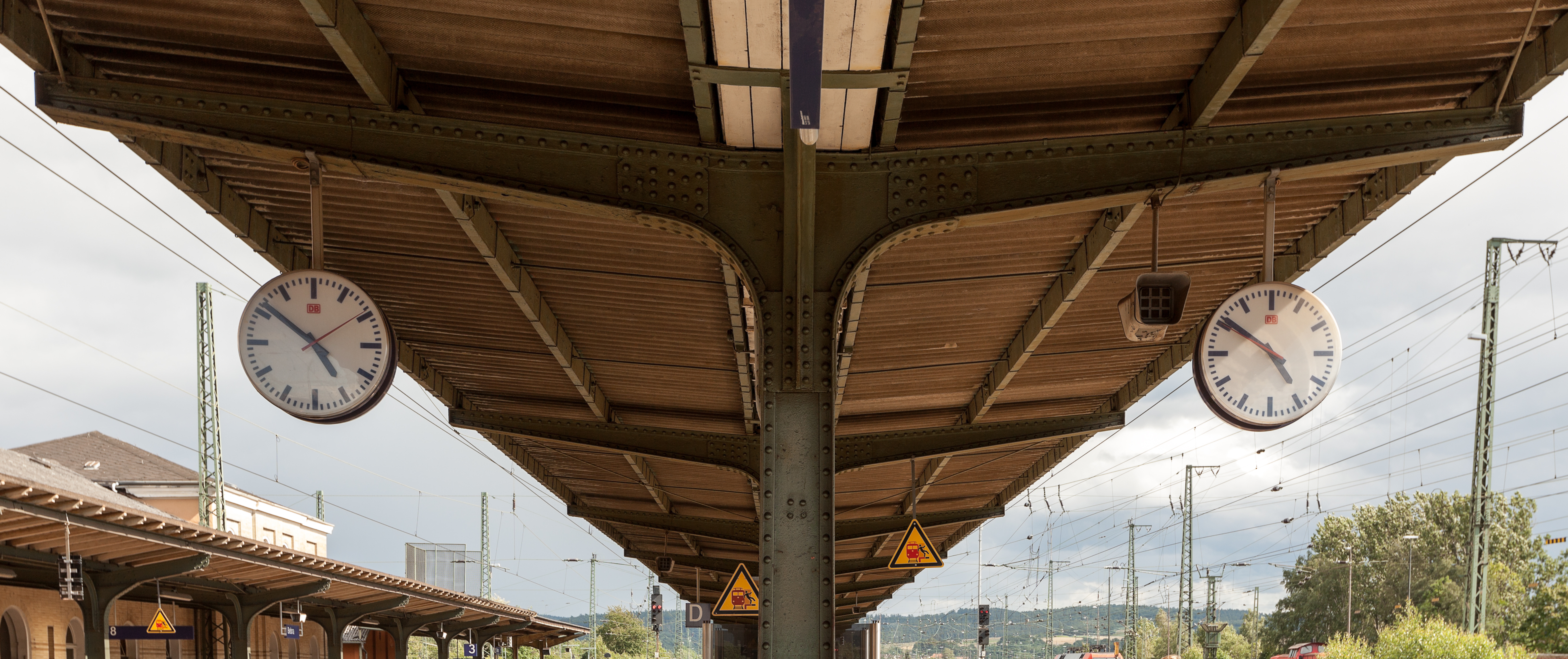 Bahnhofsuhren auf dem Bahnhof Bebra. Deutlich zu erkennen die nicht-synchronen Sekundenzeiger.